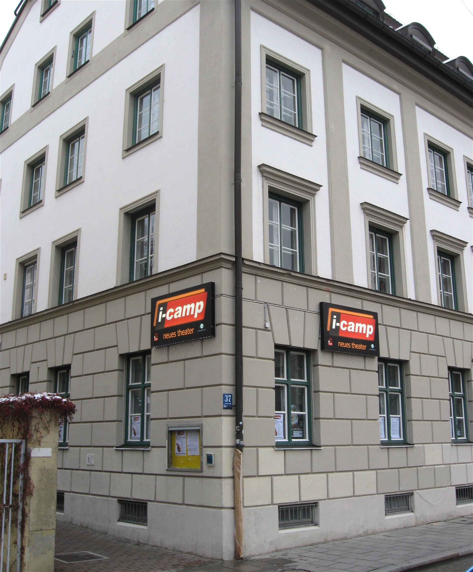 I-camp/Neues Theater München, Entenbachstr. 37, München